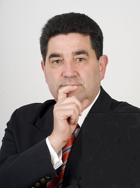 Yves Marie Adeline, un historien conteur